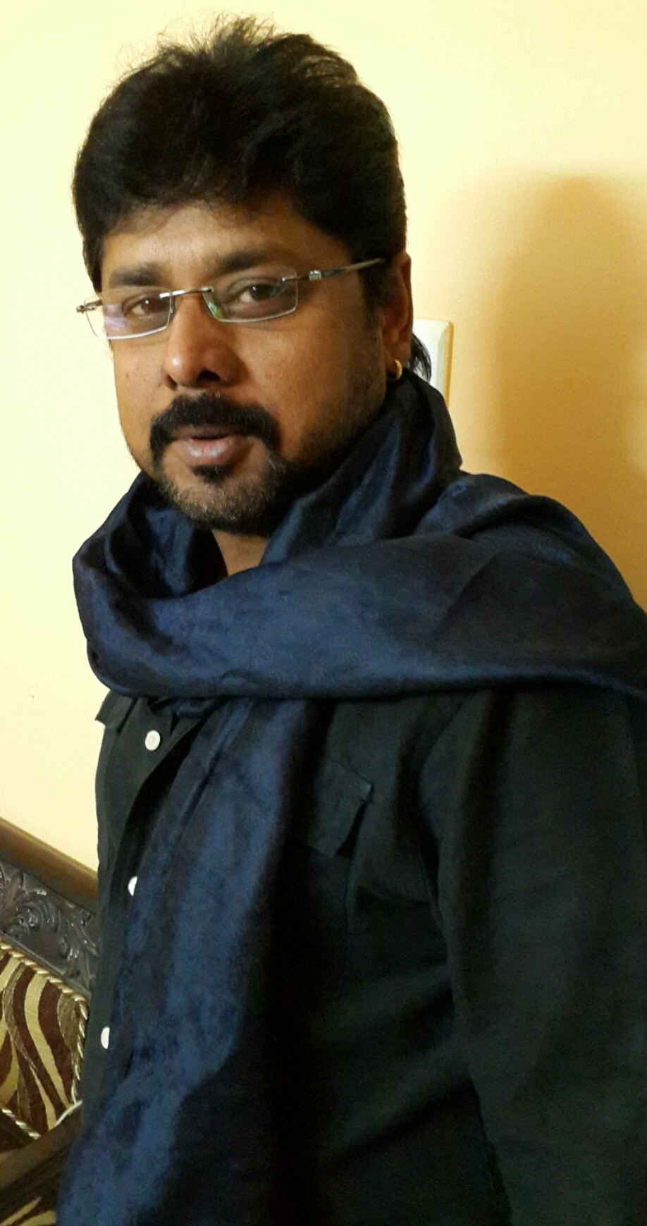 Raja Chanda.